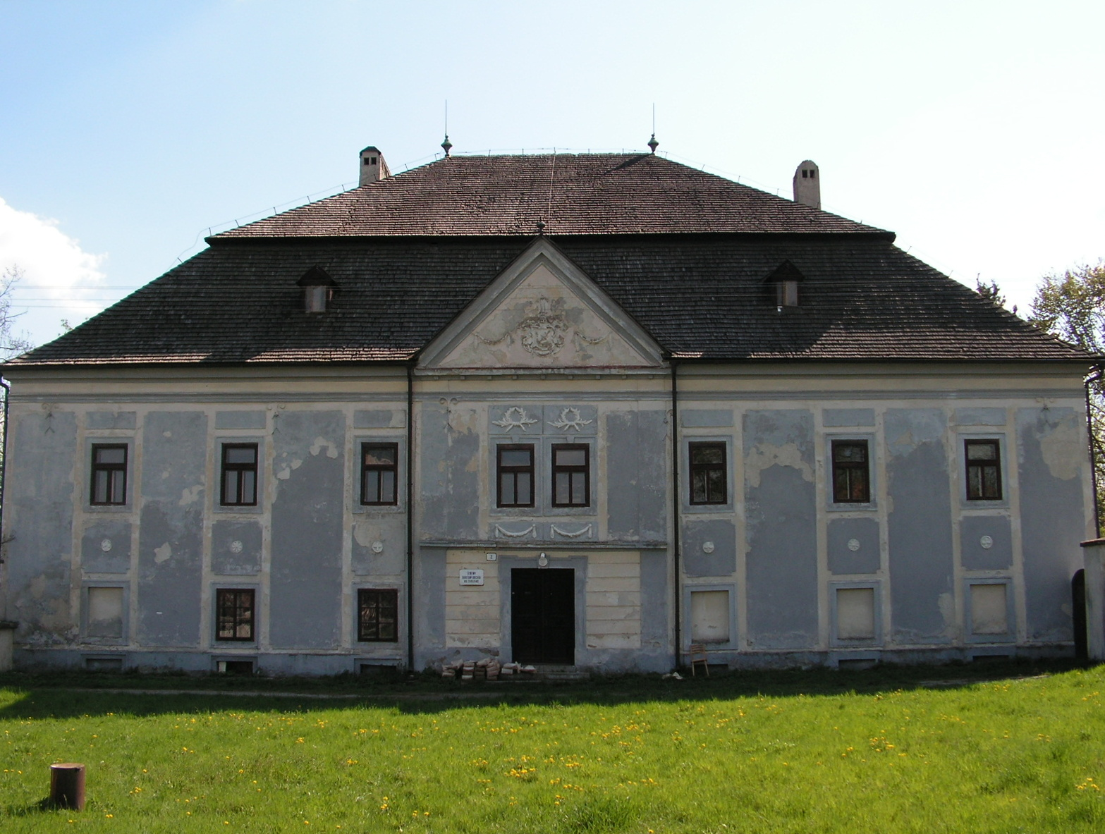 Ostrá Lúka, Slovensko - kaštieľ rodiny Ostrolúckych - fasáda